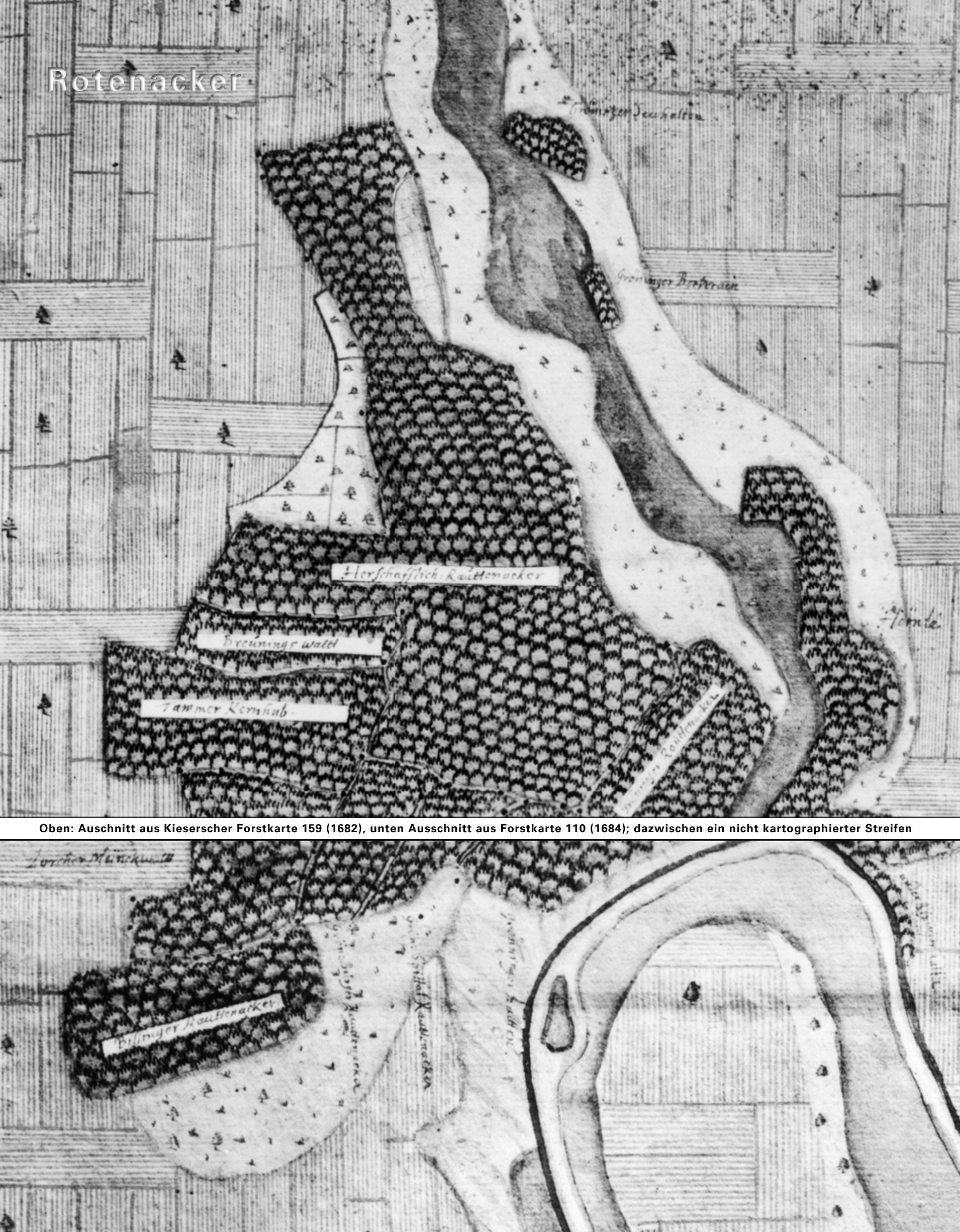 Rotenacker auf den Kieserschen Forstkarten 159 (Gröningen) von 1682 und 110 (Unterriexingen) von 1684 mit Parzellenbezeichnungen: Herrschaftlich Rauttenacker, Gröninger Rauttenacker, Grön. Spital-Rauttenacker, Grön. Bürger-Rauttenacker, Bissinger Rauttenacker, Lorcher Mönchswald, Tammer Kernhub und Breuningswald (Grön. Bürger) Zwischen den beiden Karten wurde ein Streifen nicht kartographisch erfasst.